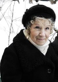 Надежда Вербицкая на съёмках фильма "Ножницы", 2009 г.